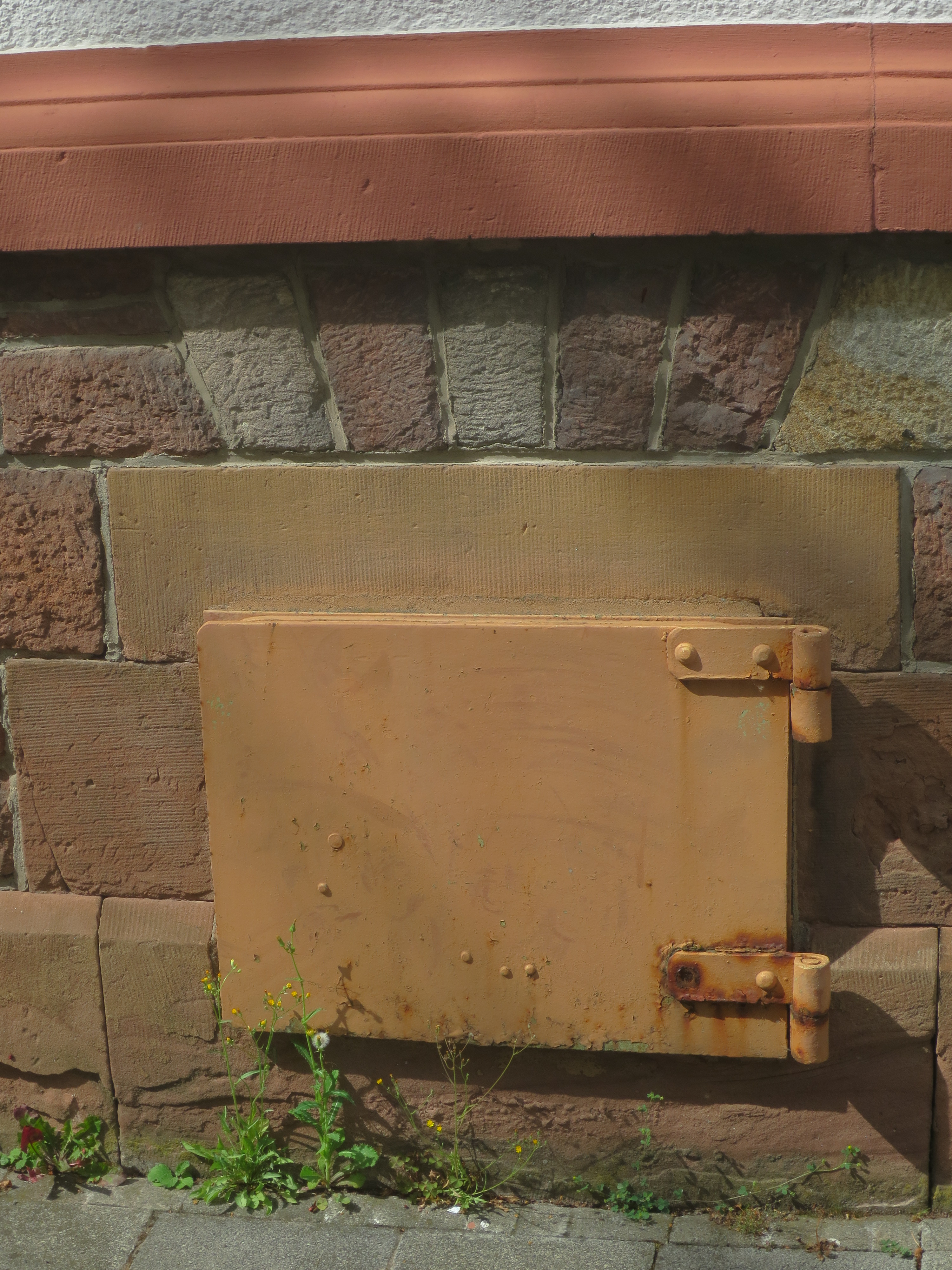 Stahltür-Verschluss des Kellerfensters eines Luftschutzraums aus dem 2. WK, Liebfrauenring 17, Worms, Deutschland